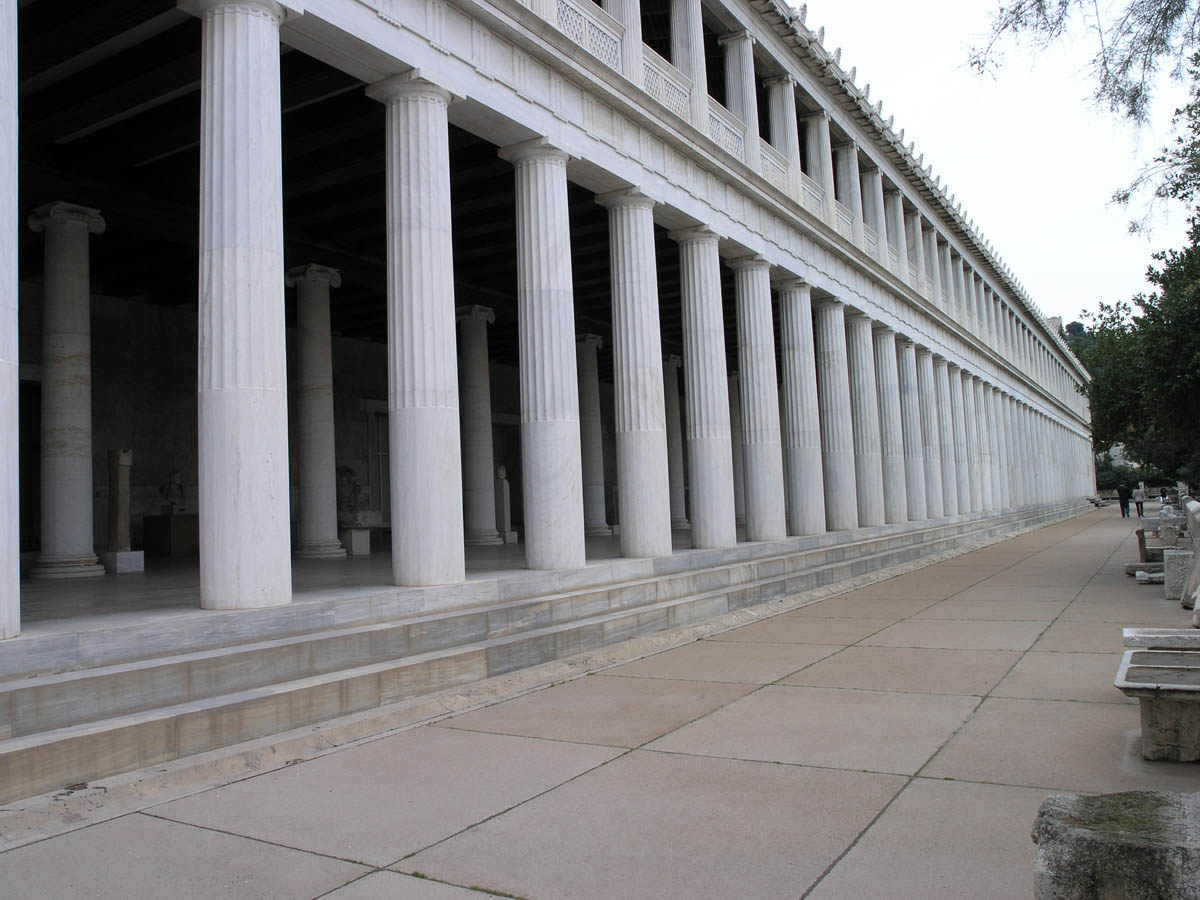 Façade de la Stoa d'Attale vue du nord - Musée de l'Agora antique d'Athènes.